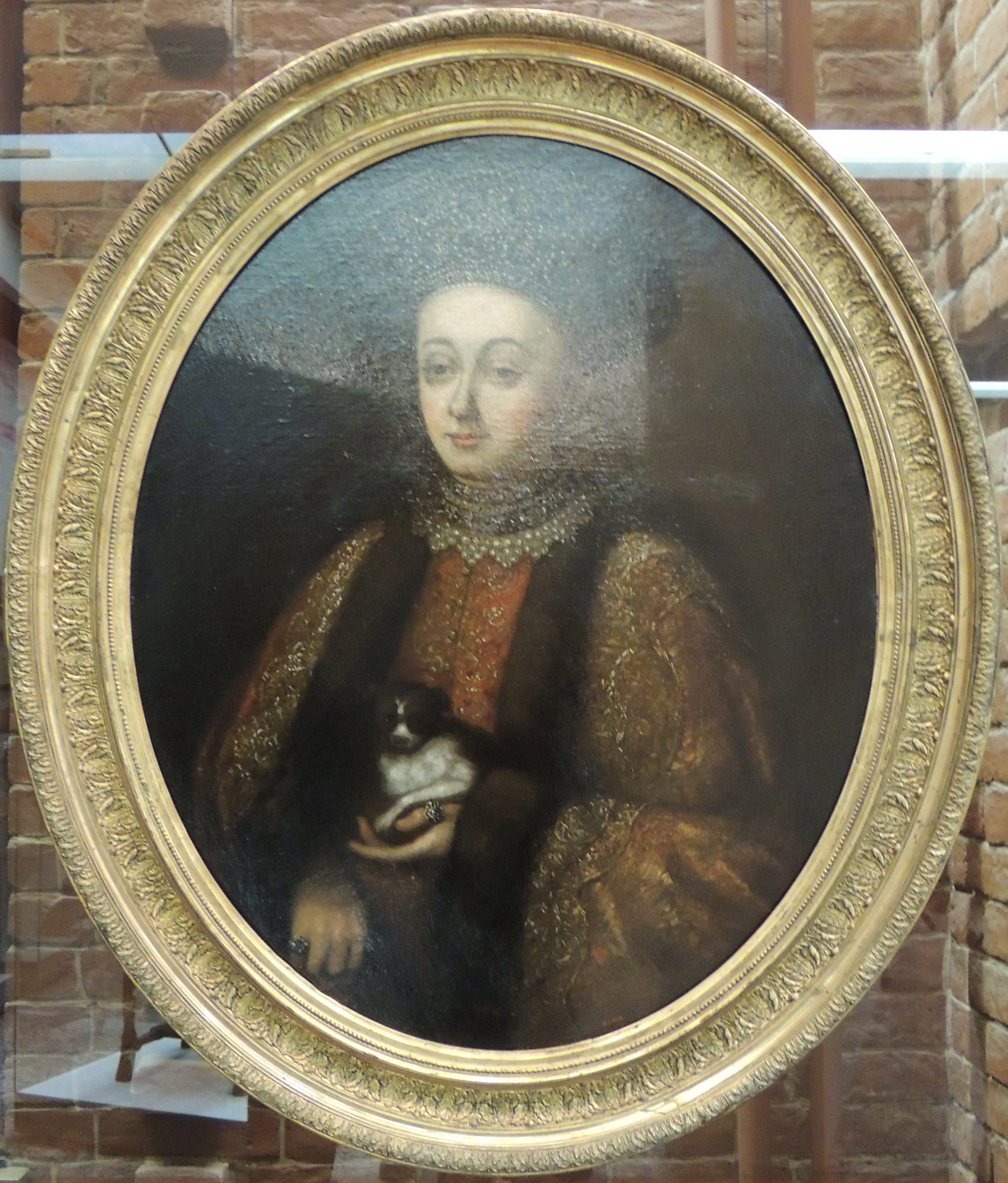 Выставка "Романовы. Начало династии", приуроченная к 400-летию избрания на царство Михаила Федоровича Государственный Исторический музей, весна 2013 года